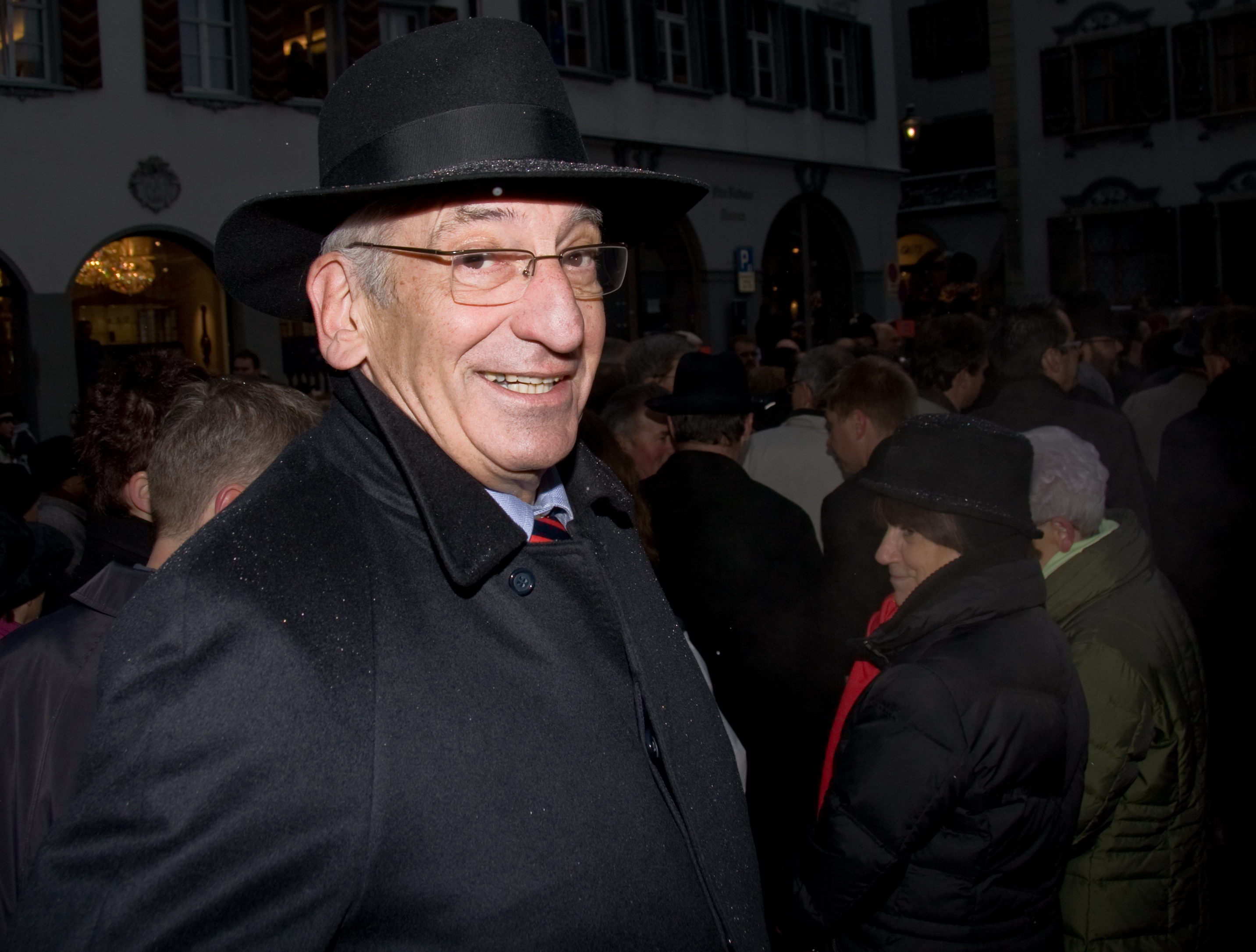 Bundesrat Pascal Couchepin in Herisau AR